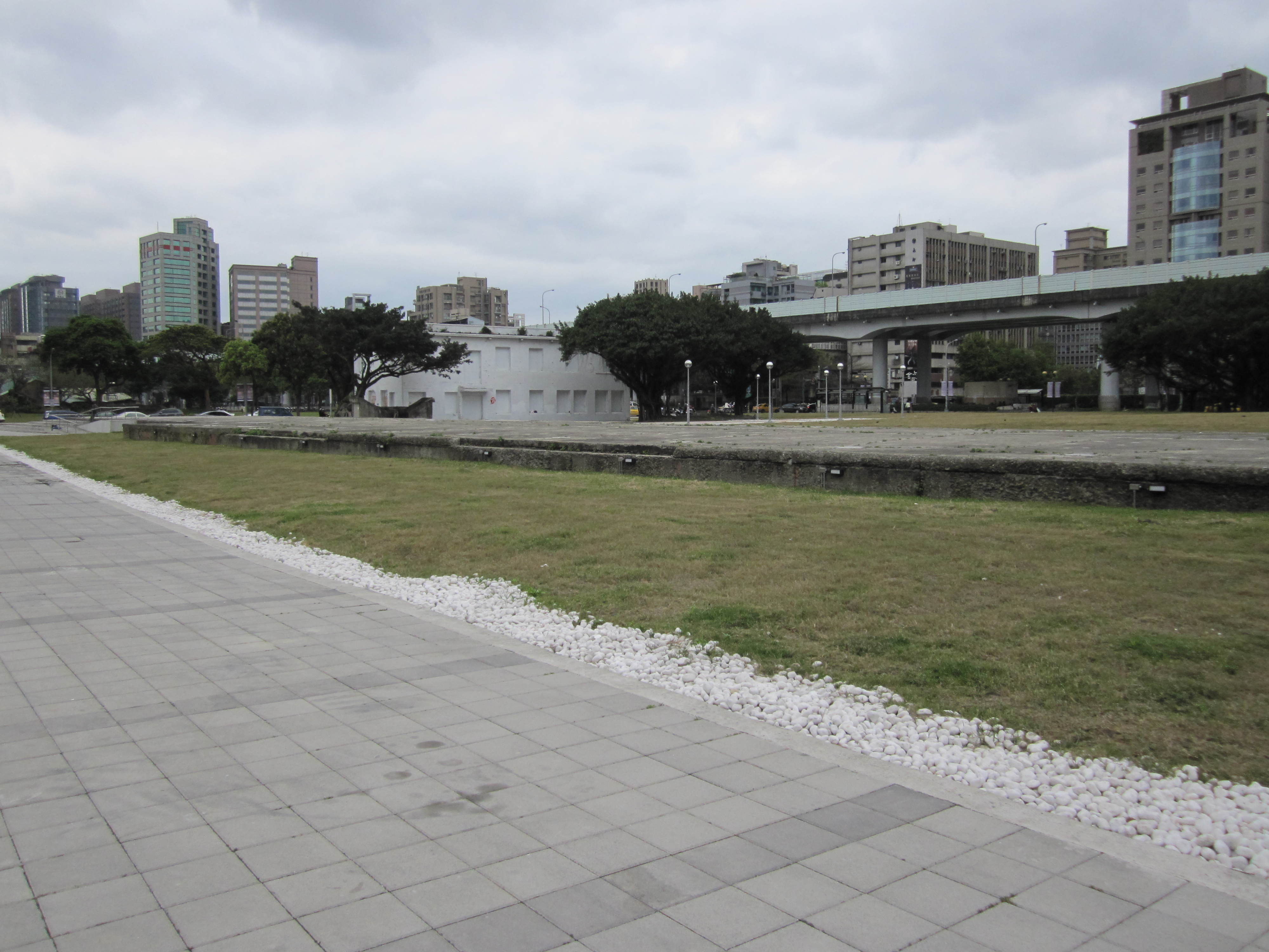 中文（台灣）: 華山車站後方月台遺址。